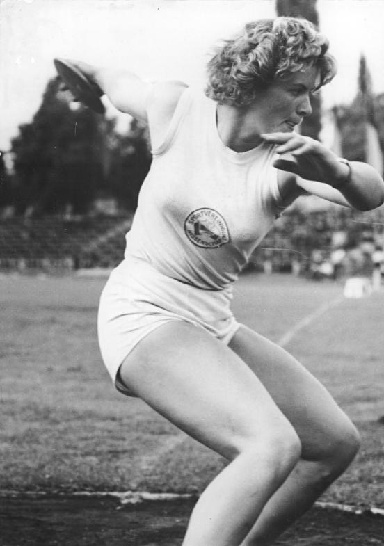 Wilfriede Tews Zentralbild Wlocka 24.7.1956 VII. DDR-Leichtathletik-Meisterschaften in Erfurt In der Zeit vom 20. bis zum 22. Juli 1956 wurden im Erfurter Georg-Dimitroff-Stadion die VII. Leichtathletik-Meisterschaften der DDR ausgetragen. UBz: Mit dem zweiten Platz mußte sich im Diskuswerfen der Damen Wilfriede Tews (DHfK Leipzig) zufriedengeben.